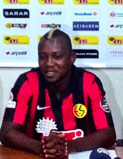 Ibrahım Sissoko Eskişehirspor ile 3 yıllık sözleşme imzaladı.